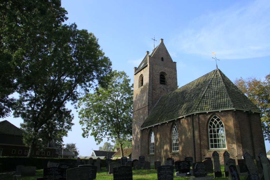 Een klein dorp met ook maar een klein maar heel mooi kerkje.